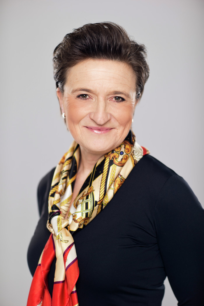 Monica Lingegård